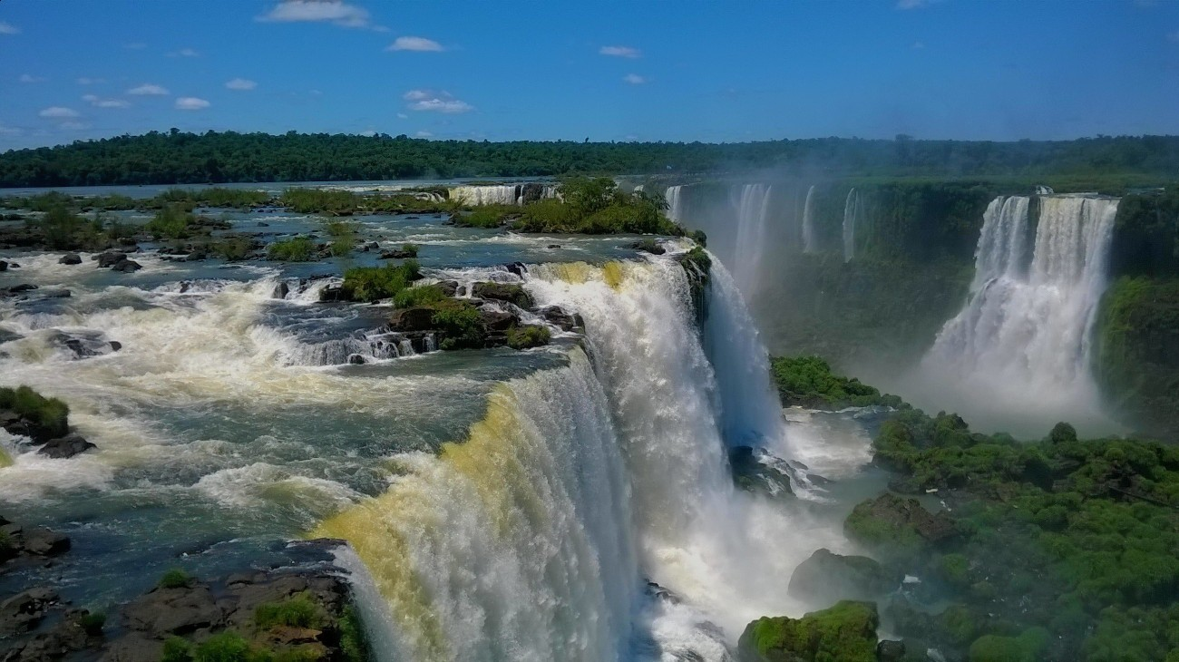 Vislumbre do paraíso, onde a mente se liga a natureza e o coração ao som das águas.